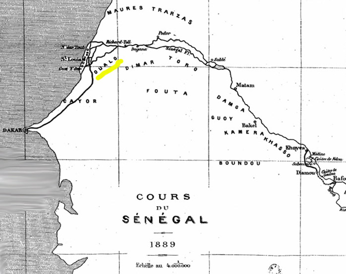 Localisation du Waalo (Oualo) sur une carte du fleuve Sénégal (1889) dans Eugène Béchet, Cinq Ans de séjour au Soudan français, E. Plon, Nourrit, Paris, 1889, après la page 270